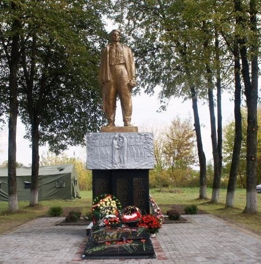 Памятник на братской могиле установлен в 1964 г. в д. Бакшты